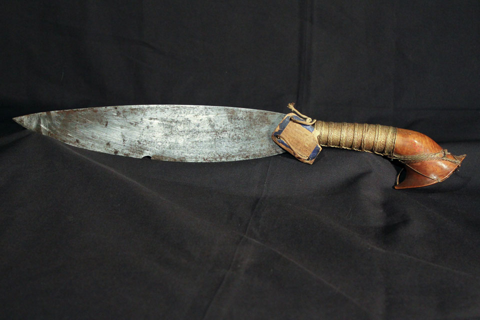 Barong d'origen filipí. Duu una targeta amb una incripció: Perteneció a uno de los tres juramentados que entraron en la casa del sultán Harun (16 agosto 1888). Mataron a un moro y a tres chinos e hirieron a siete de estos.